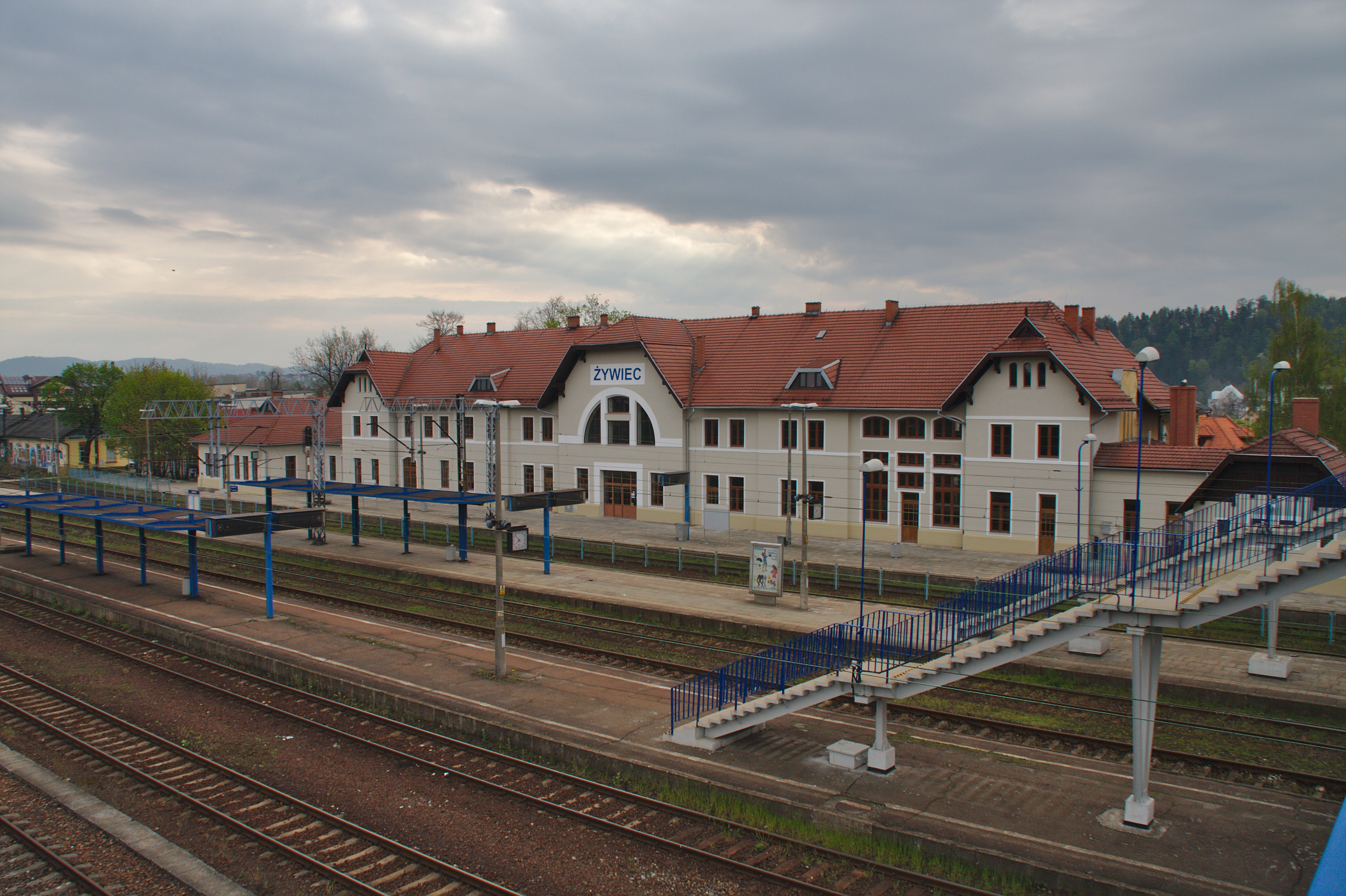 Dworzec kolejowy w Żywcu w roku 2015 przeszedł gruntowny remont eelwacji i stolarki okiennej od strony torów